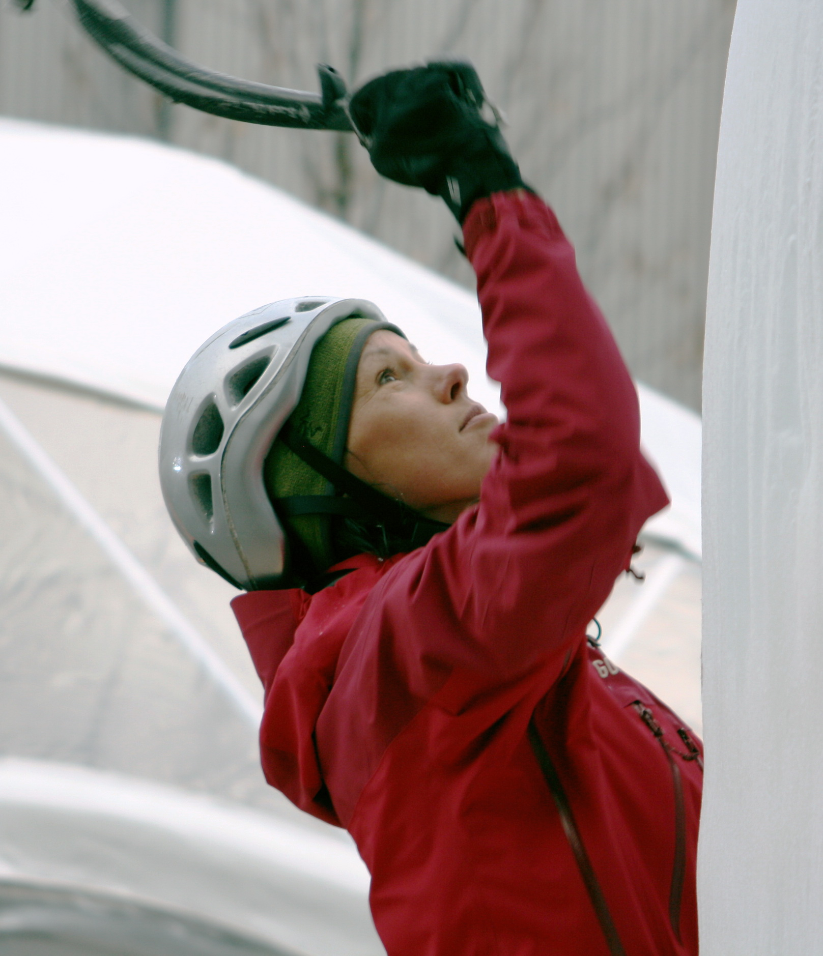 Ines Papert.